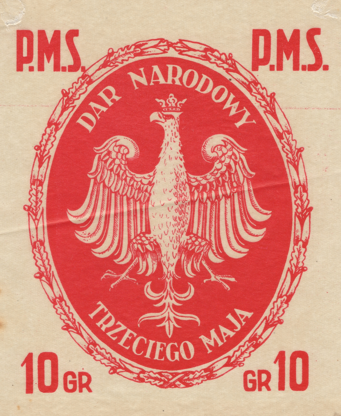 Druk Polska Macierz Szkolna Dar Narodowy Trzeciego Maja 1920